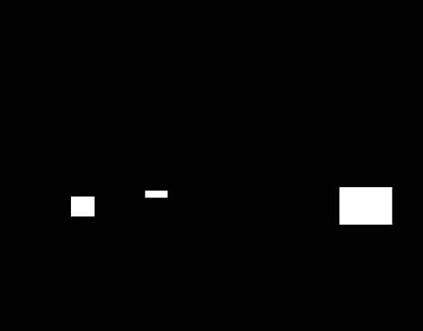 Screenshot Tontaubenschiessen Philips Tele-Spiel ES 2201